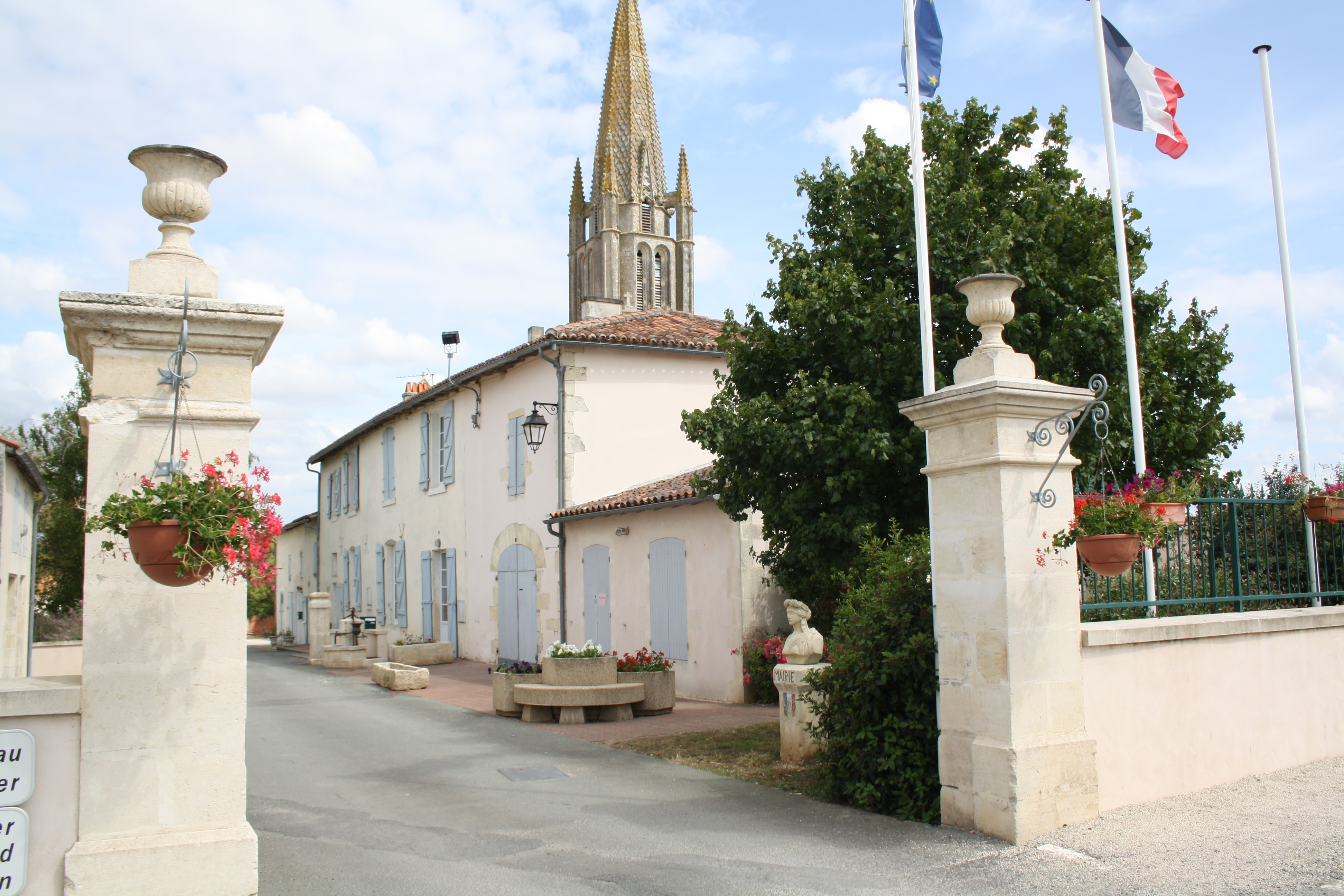 Mairie de Bignay (Charente-Maritime, France).